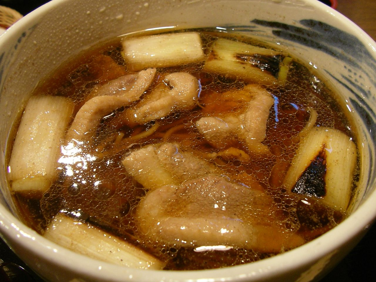 鴨南蛮そば（東京都中央区晴海、晴海トリトンにあるグルメ杵屋チェーンの蕎麦屋「信州 そば野」）鴨南蛮そば / Kamo nanban soba